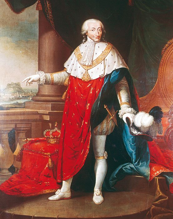 Dipinto di Vittorio Emanuele I con le Vesti cerimoniali Durante la Sua Incoronazione nel